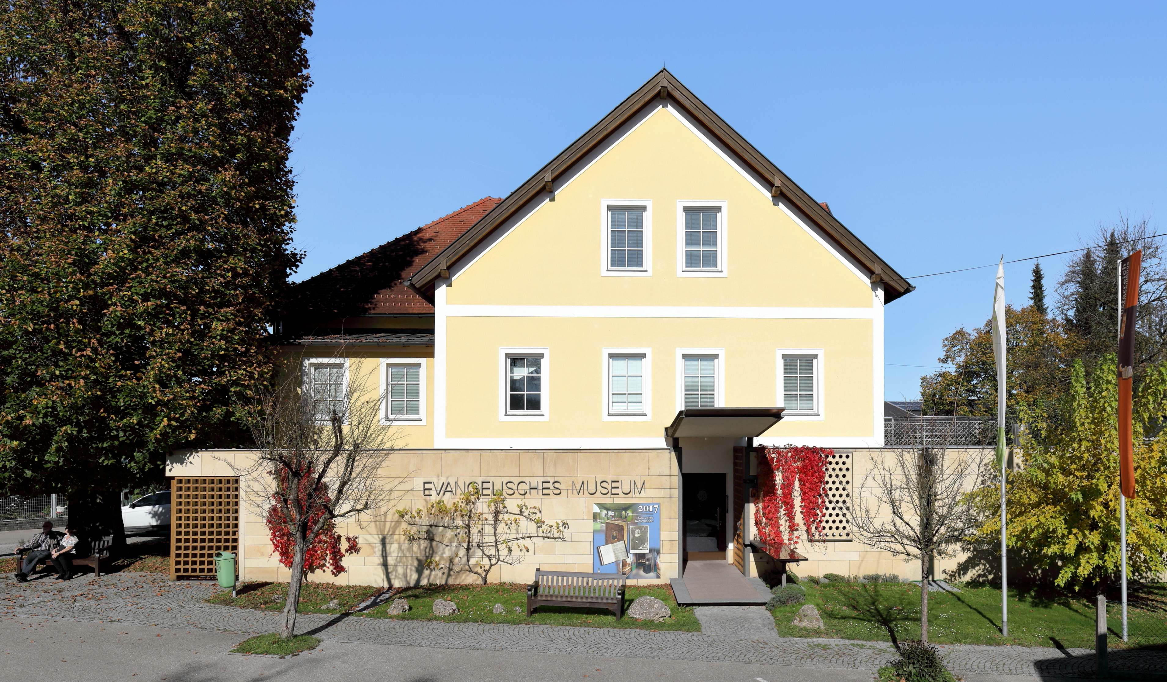 Das Evangelische Museum Oberösterreich in Rutzenmoos, ein Ortsteil der oberösterreichischen Marktgemeinde Regau. Das Museum in der ehemaligen evangelischen Volksschule wurde am 16. September 2000 eröffnet und präsentiert in 13 Räumen auf drei Etagen die Geschichte der evangelischen Christen in Oberösterreich.